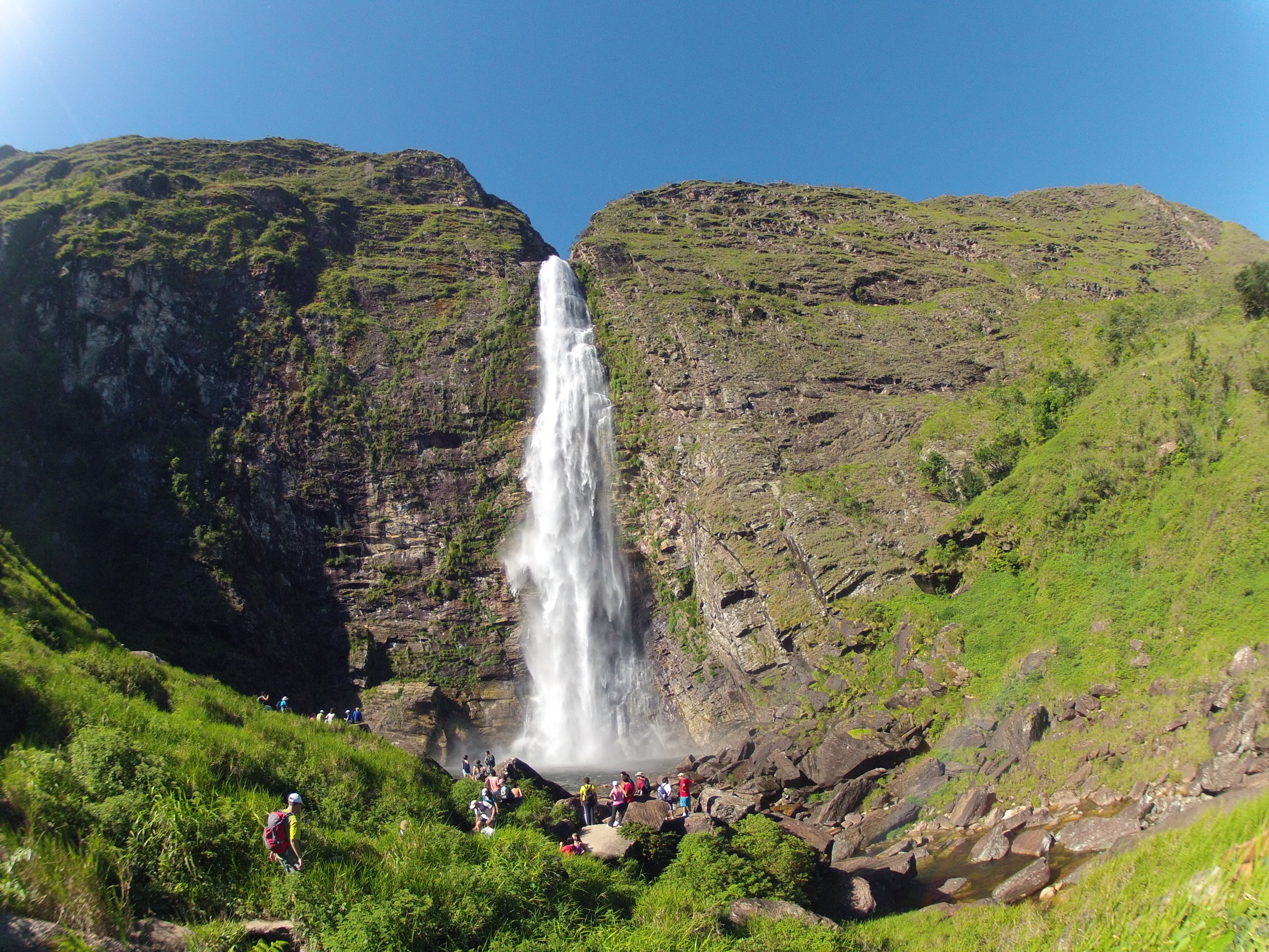 CACHOEIRA DA CASCA D" ANTA